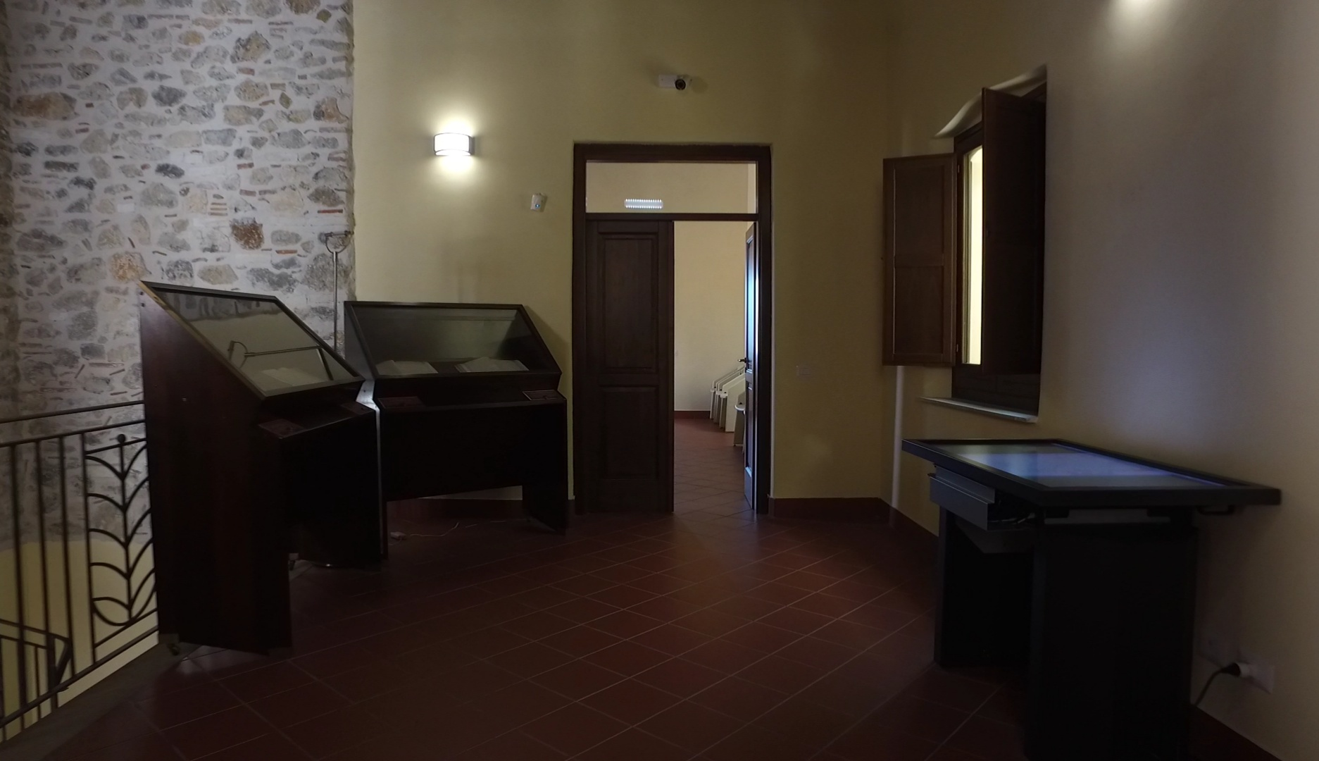 Sede attuale della biblioteca comunale Carlo Danio di Grumento Nova (Potenza): collezione di libri antichi